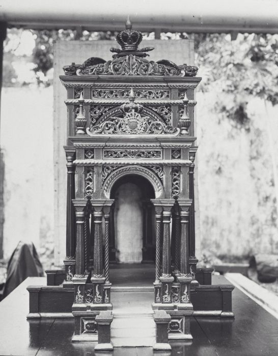 Foto. Model van de Madoerenggo (zijaanzicht) in het museum van Surakarta